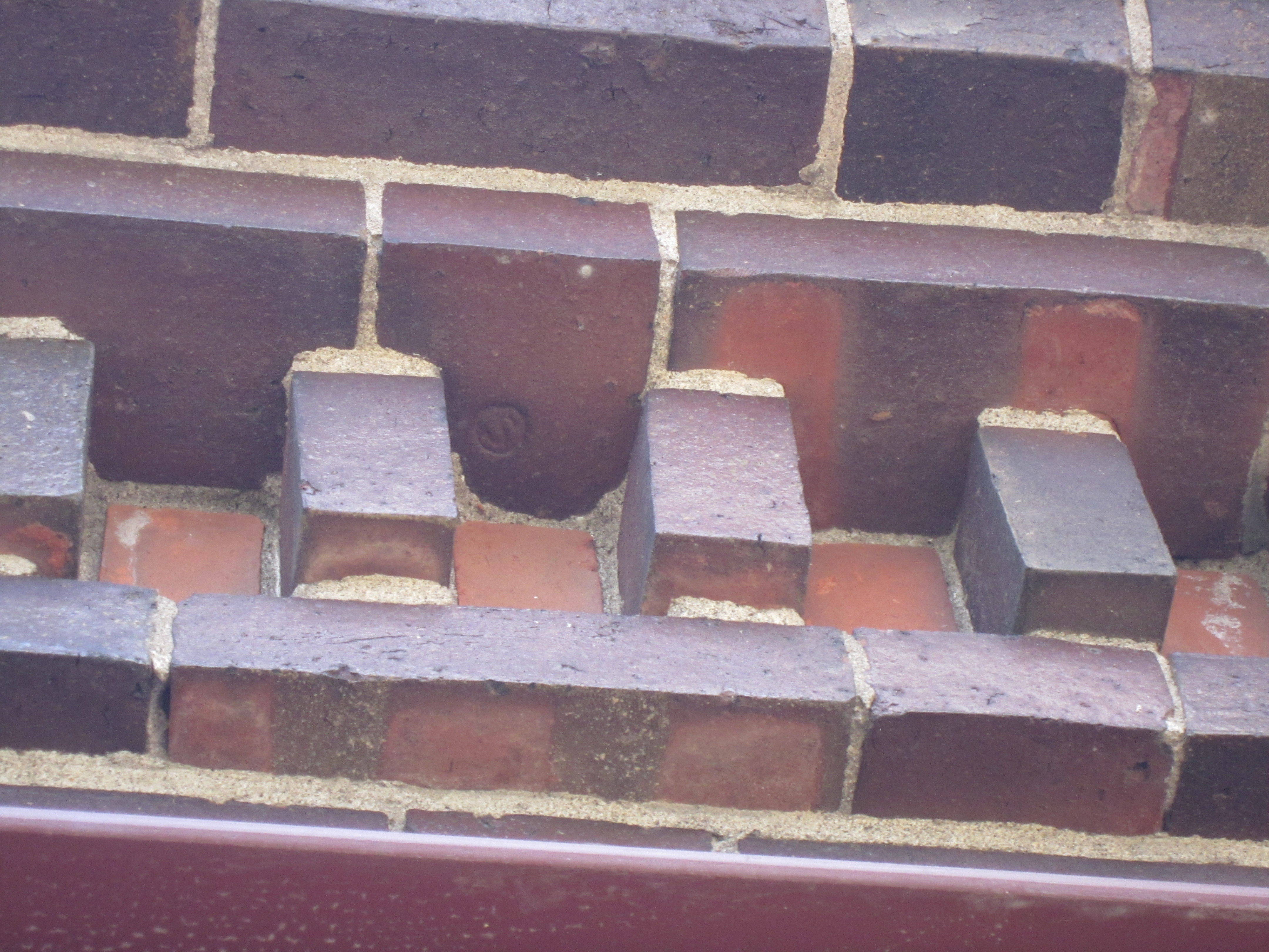 江別市史跡 火薬庫の刻印のあるレンガ